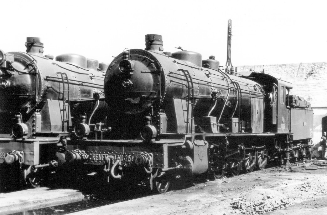 Locomotora de vapor Renfe 240-2154 en Mérida (España)